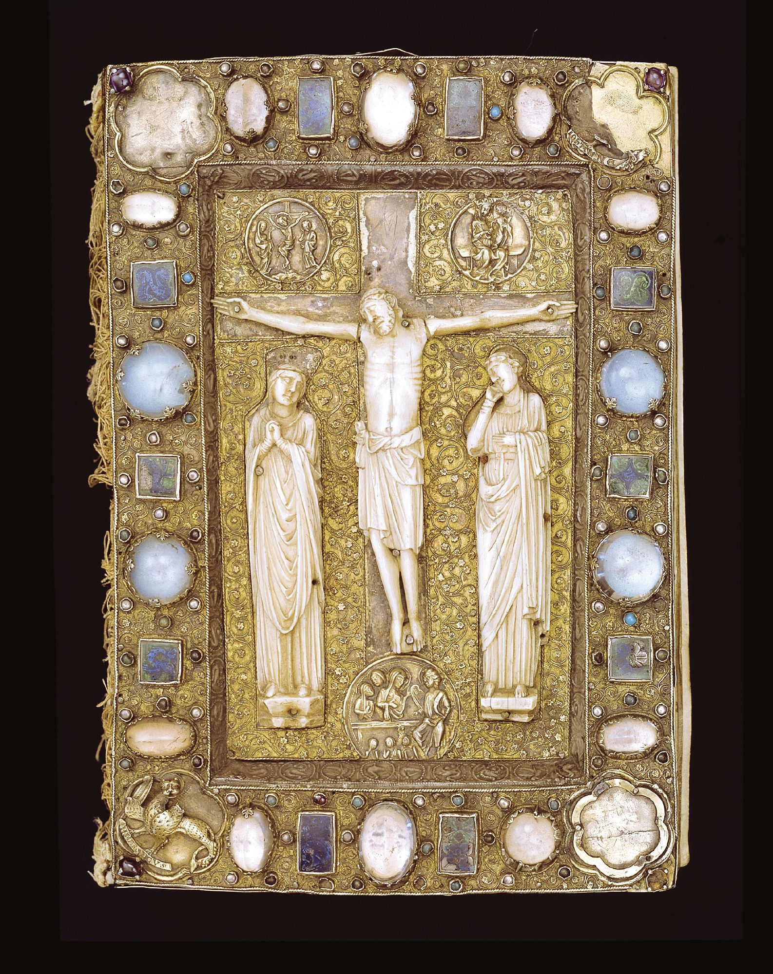 Evangeliebog, som siden 1600-årene tilhørte Horne Kirke på Fyn. Selve den fint illuminerede bog er lavet til en kirke i Norden o. 1225. En krucifiksgruppe af hvalrostand er fra samme tid, mens selve bogbindet med emalje og halvædelsten er dansk arbejde fra begyndelsen af 1300-årene.